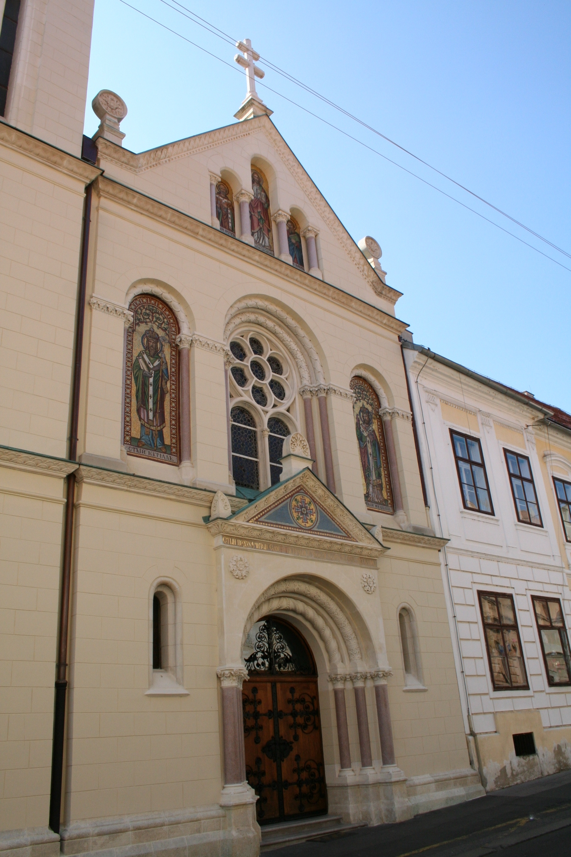 Crkva svetih Ćirila i Metoda u Zagrebu